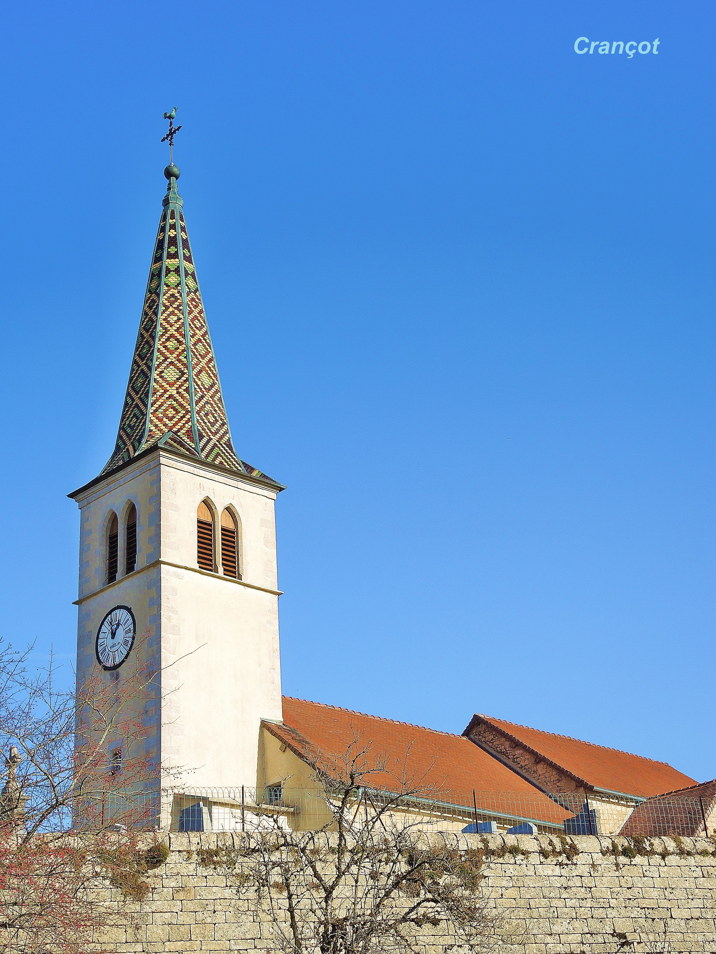 Eglise sainte Marie-Madeleine. De Crançot. Département du Jura. France.